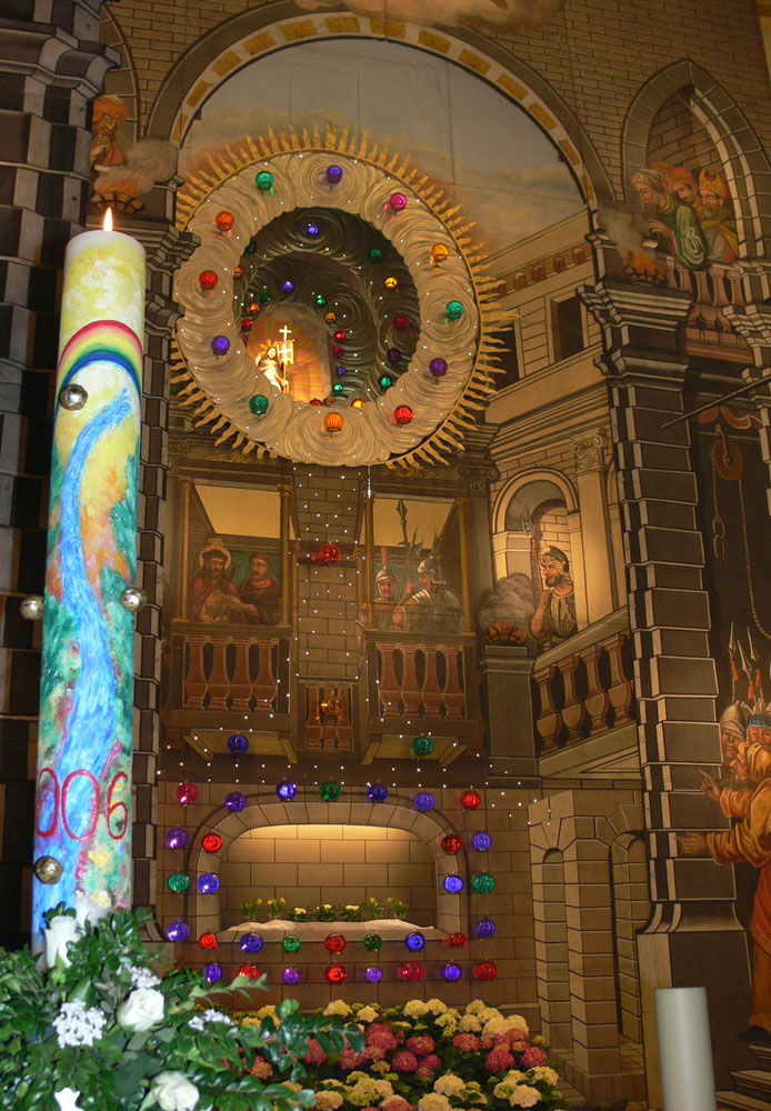 Das Ostergrab in der Klosterkirche Reutte